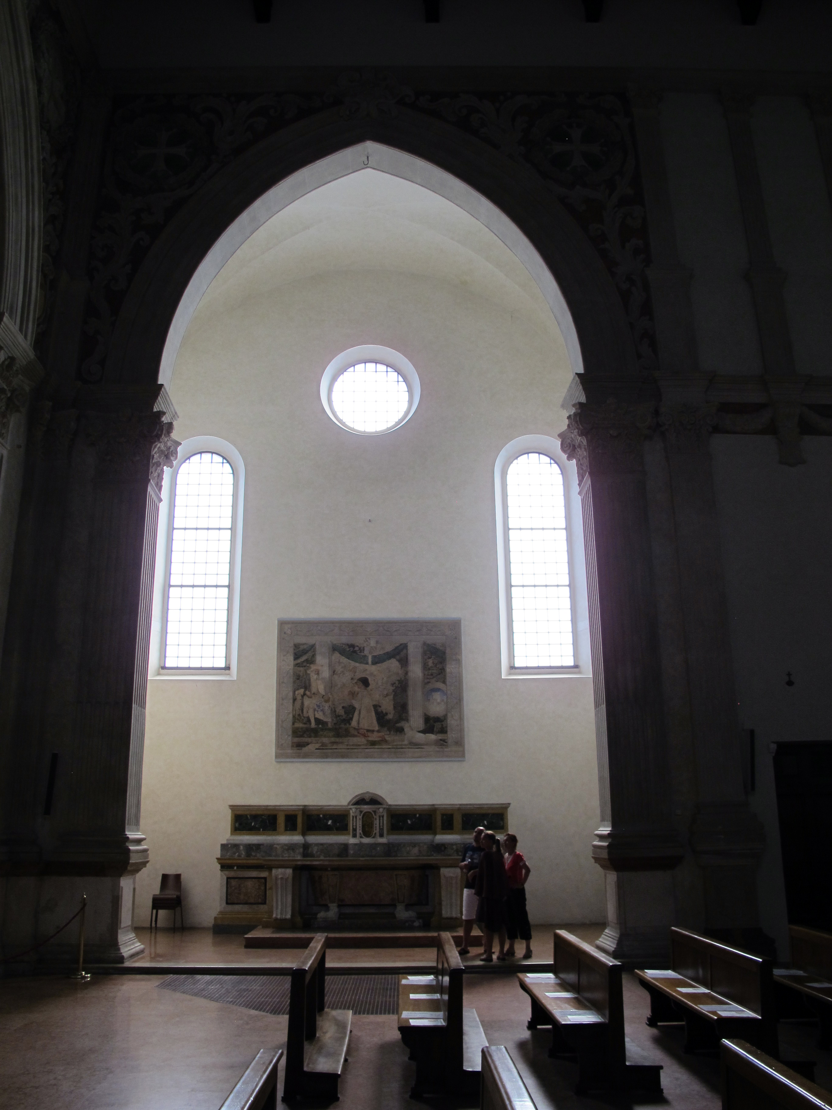 Tempio Malatestiano - MIBAC This is a photo of a monument which is part of cultural heritage of Italy.